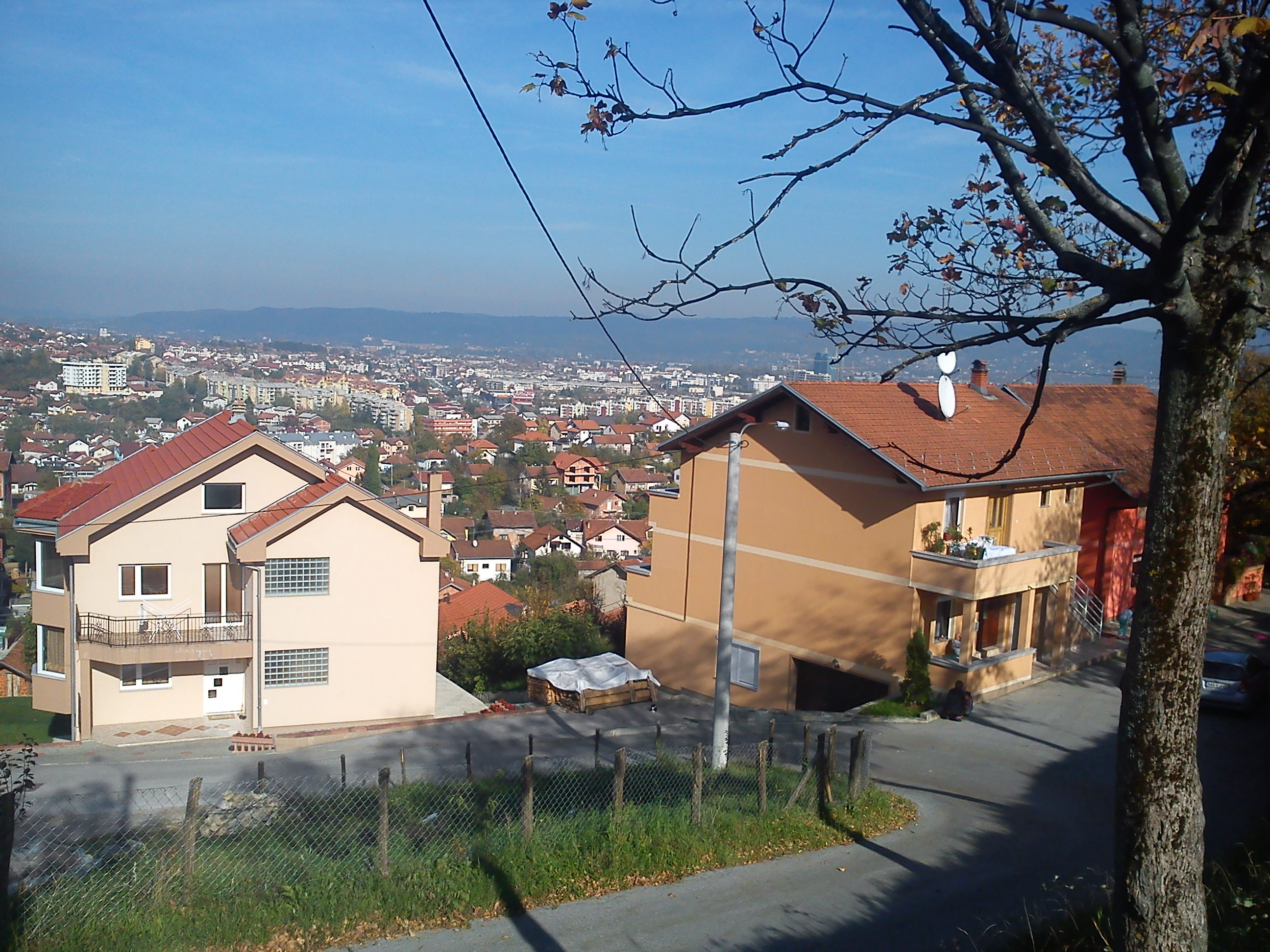 Pobrđe, panorama